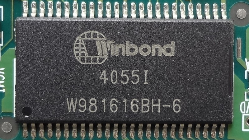 華邦電子記憶體顆粒4055I W981616BH-6